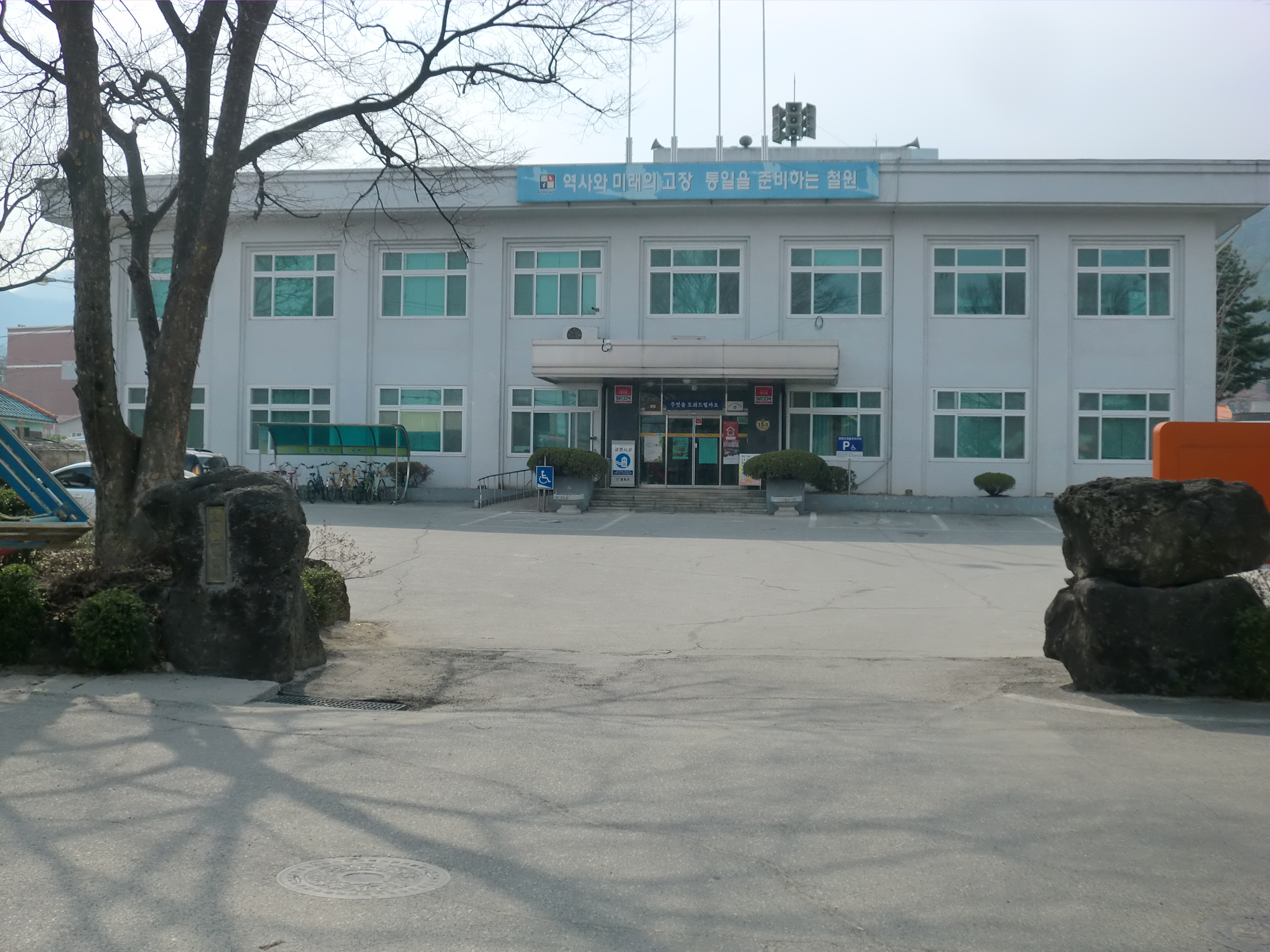 강원도 철원군에 있는 철원읍사무소